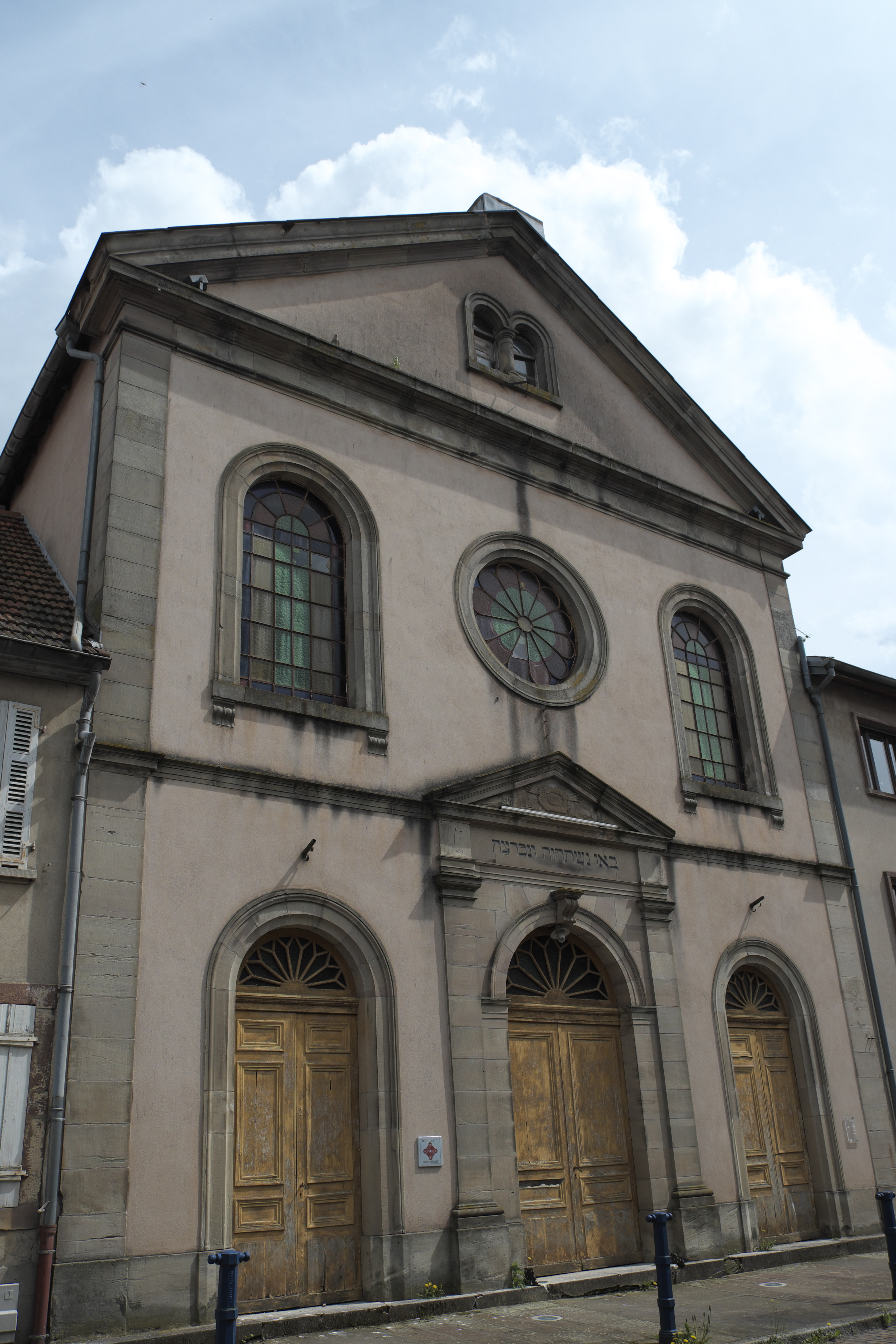 Synagoge in Phalsbourg im Département Moselle (Lothringen/Frankreich)